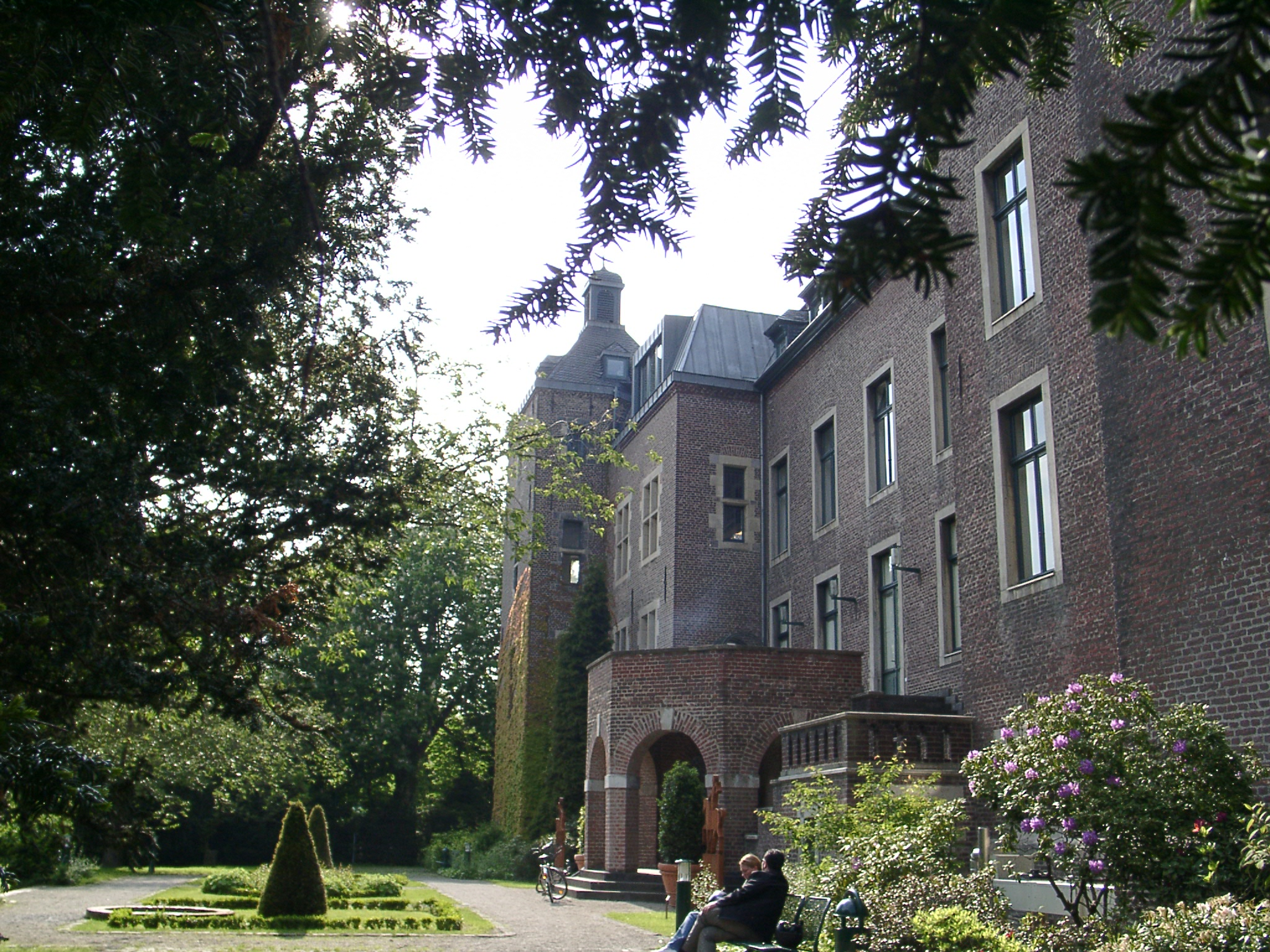 Rückseite von Schloss Neersen, Neersen, Hauptstraße 6 This image shows a heritage building in Germany, located in the North Rhine-Westphalian city Willich (no. 10).